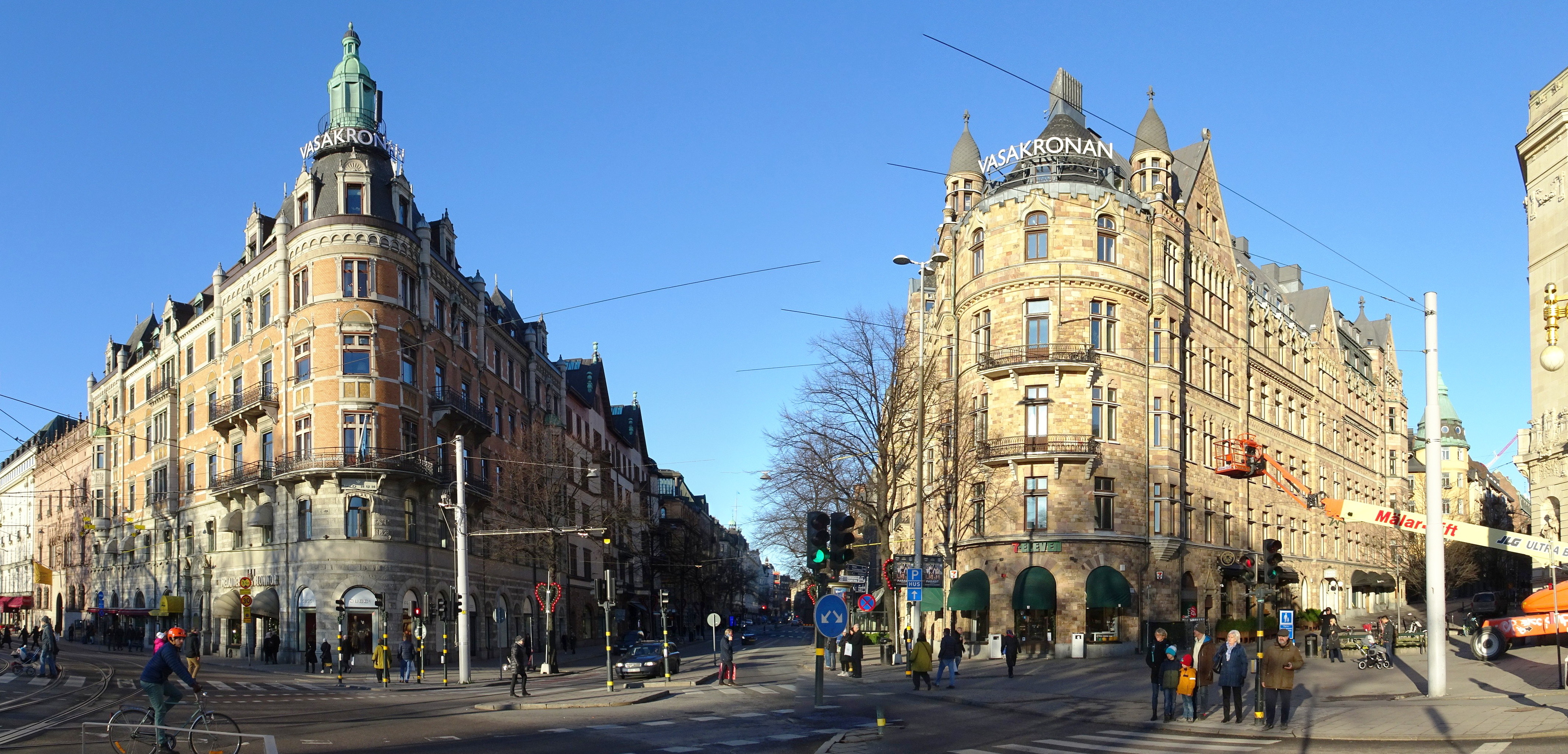 Kvarteret Skravelberget mindre (t.v.) och kvarteret Matrosen (t.h.) sedda från Nybroplan mot norr "porten till Birger Jarlsgatan"